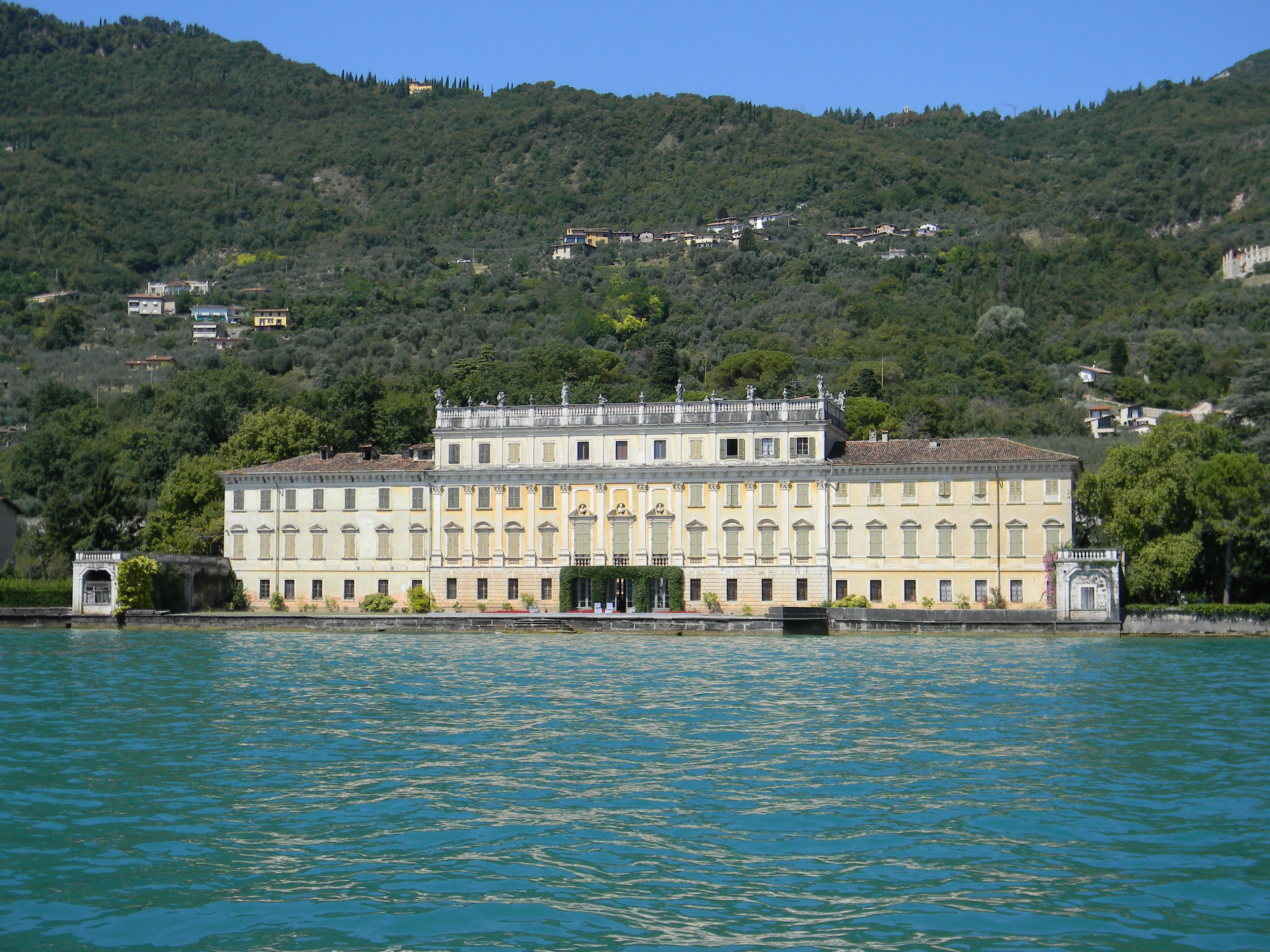 Villa Bettoni à Bogliaco di Gargnano, vu depuis le lac de Garde.